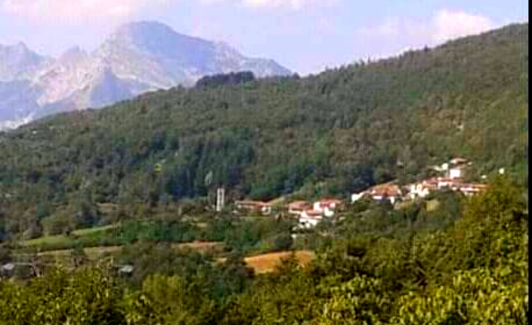 Il piccolo paese di Cogna ripreso da Sillano